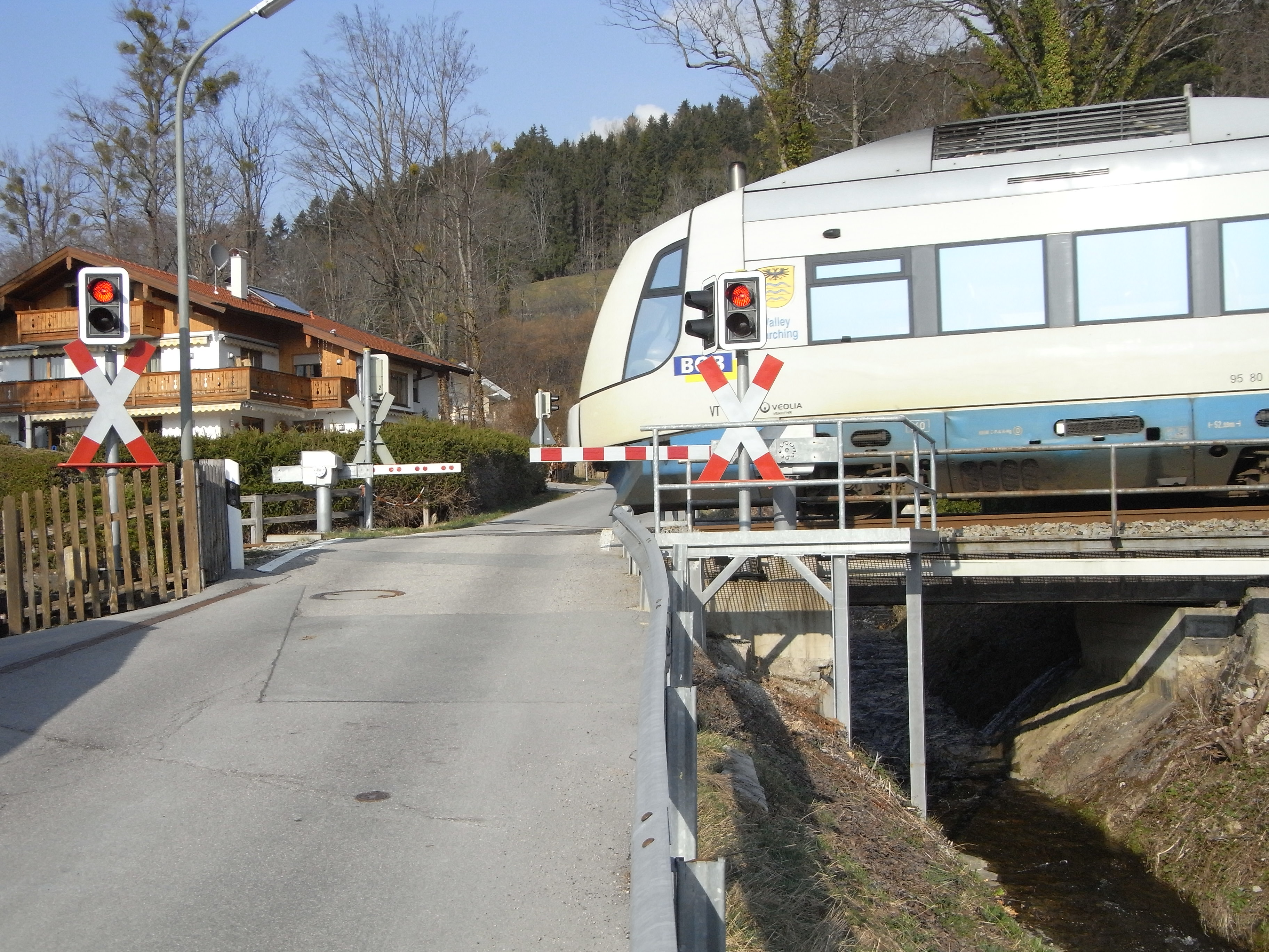 Ein Integral-Triebwagen der BOB kreuzt den Buchbergweg bei Sankt Quirin (Gmund am Tegernsee). Rechts unten der Grambach.